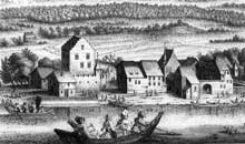 Ruderboot auf dem Greifensee